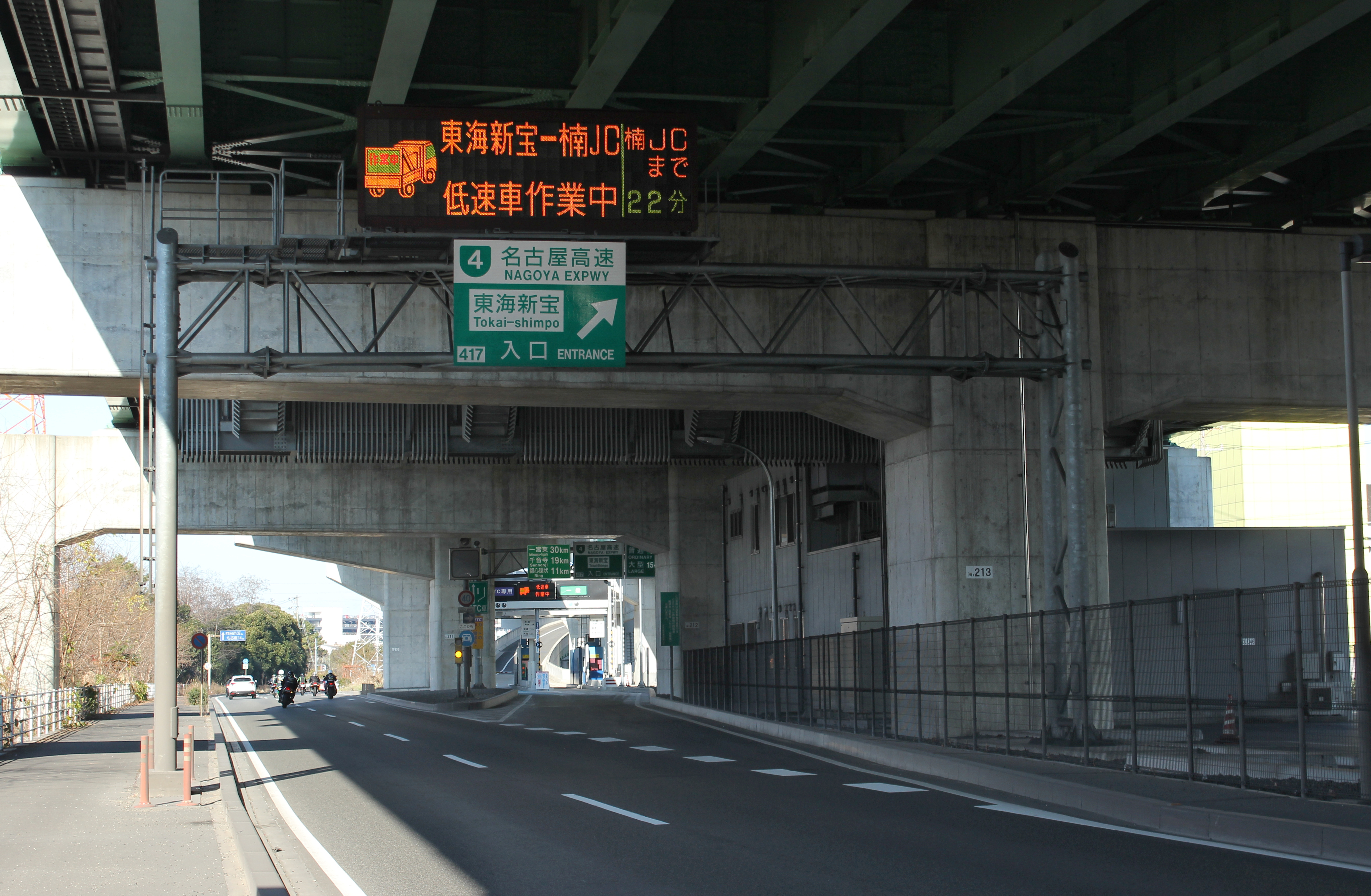 名古屋高速4号東海線 東海新宝入口